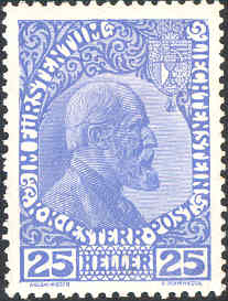 Erste Liechtensteinische Briefmarken serie, Ausgabe der k.k. Österreichischen Postverwaltung, Ausgabe 1912-1916, 25 heller, Michel 3. Fürst Johann II (1840-1929)